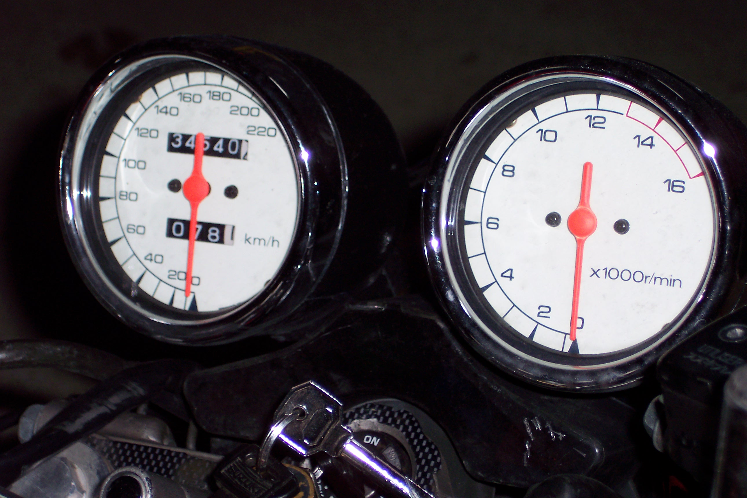 Le compte-tours d'un 400 GSFN Bandit. Inscriptions noires sur fond blanc.